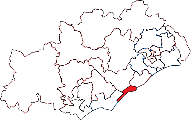 Situation du canton dans le département de l'Hérault